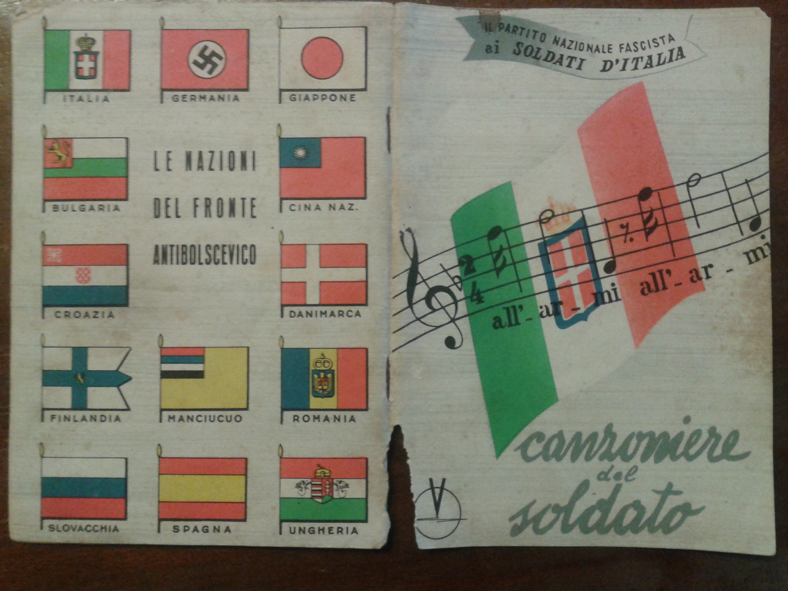 Canzoniere del soldato di epoca fascista (1942-1943 - XX-XXI), copertina e quarta di copertina Copertina recante in prima pagina la dicitura "il Partito Nazionale Fascista ai soldati d'Italia", la bandiera del Regno d'Italia, la partitura musicale della canzone All'armi!, il simbolo della V maiuscola che rappresentava sia l'alleanza tripartita tra Italia, Germania e Giappone, sia l'iniziale della parola "vittoria". Vedi Simbologia_fascista. Quarta di copertina recante le bandiere degli stati definiti "antibolscevichi": oltre a Regno d'Italia, Germania e Giappone, i Regni di Ungheria, Romania, Bulgaria; la cobelligerante Finlandia; gli stati manovrati dalla Germania, come la Croazia di Ante Pavelić e la Slovacchia; gli stati manovrati dal Giappone, come il Manciucuo, uno stato fantoccio creato dall'Impero giapponese nel 1932 e la Cina nazionalista, nota anche come Repubblica di Nanchino, governo collaborazionista istituito nel 1940 dal Giappone nelle regioni occupate della Cina; gli stati simpatizzanti, come la Spagna franchista; gli stati occupati, come la Danimarca.